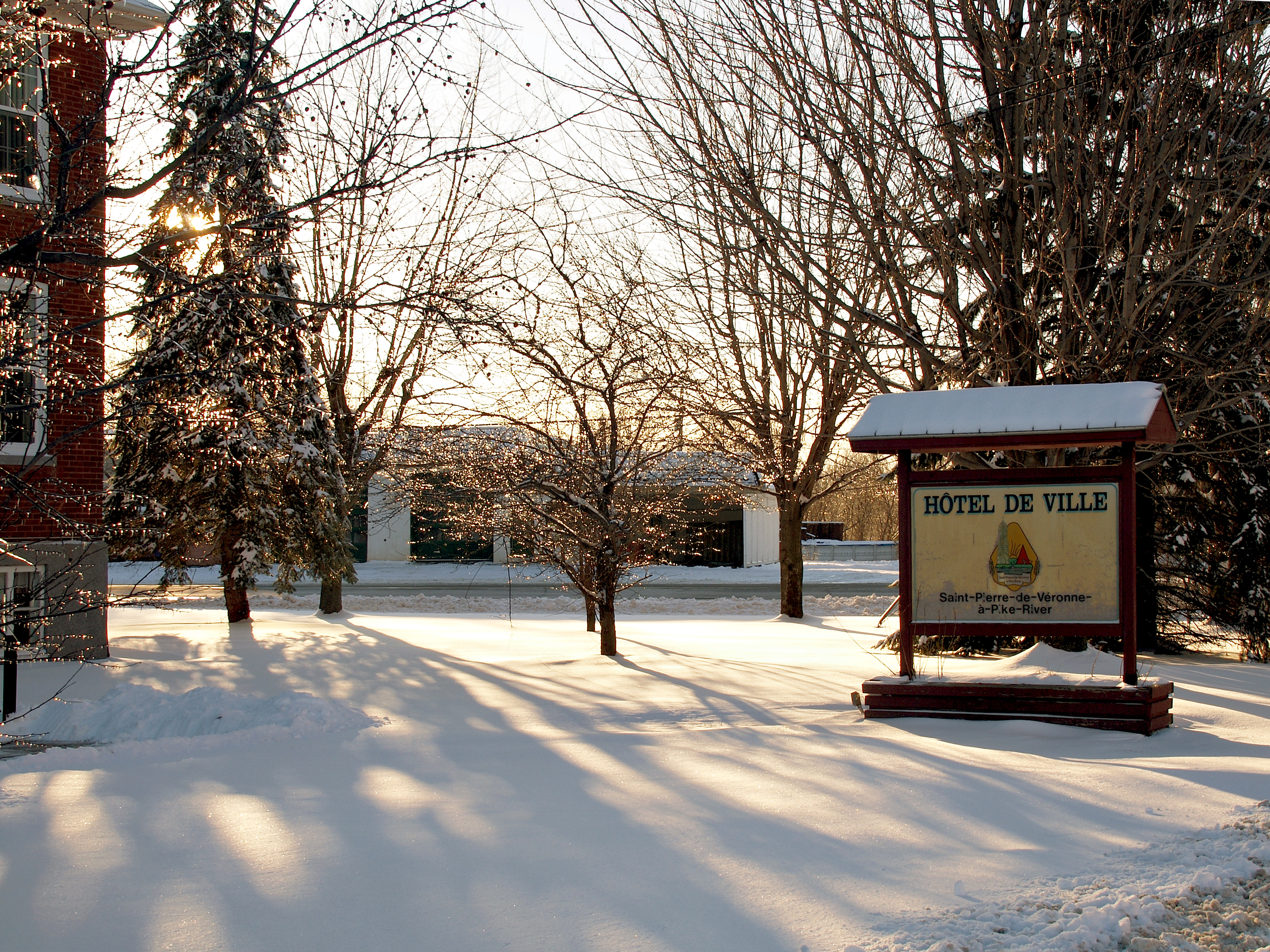 St-Pierre-de-Véronne-à-Pike-River - Devant l'Hôtel de Ville